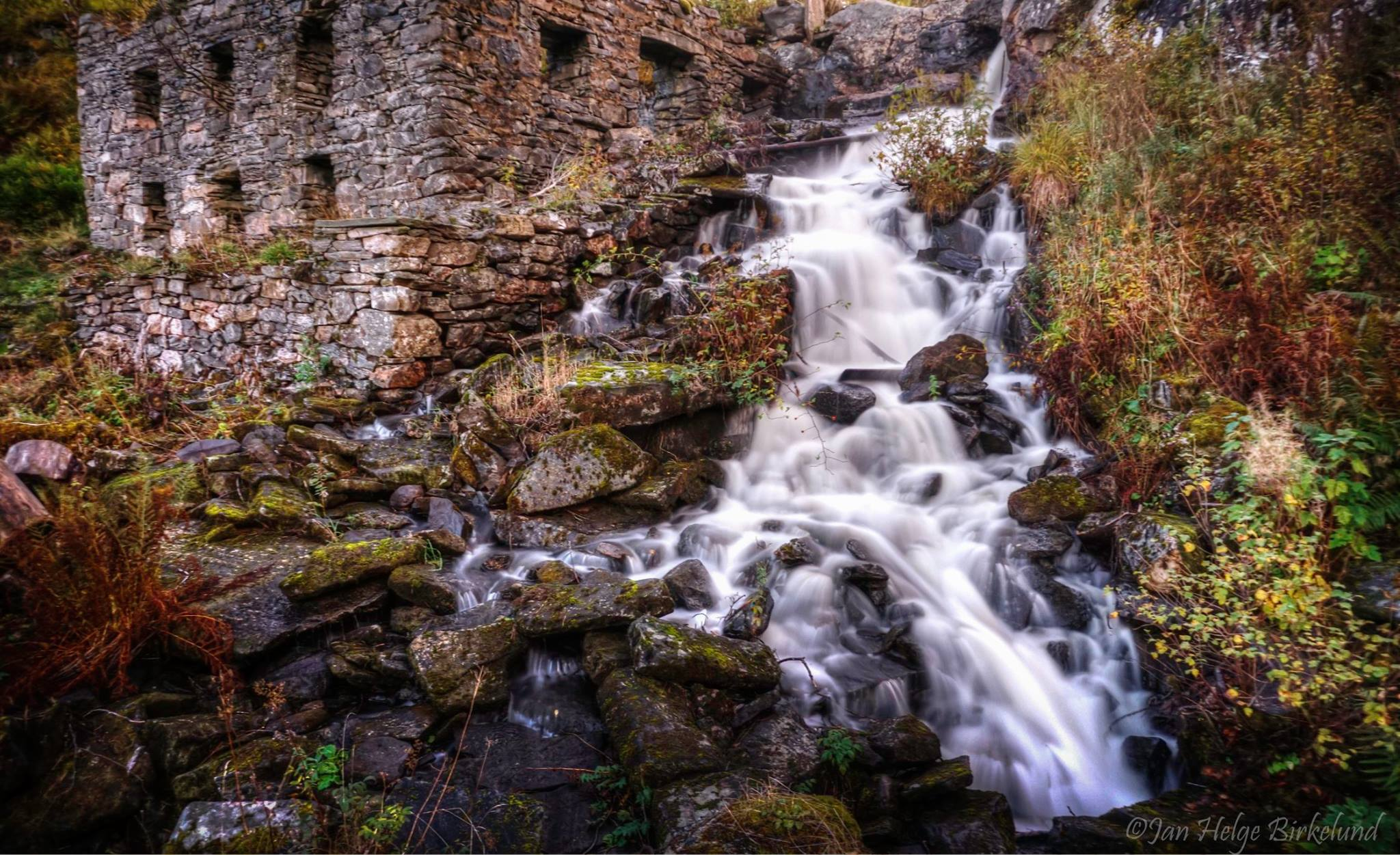 Gammelfossen, Averøy Fotografert av Jan Helge Birkelund